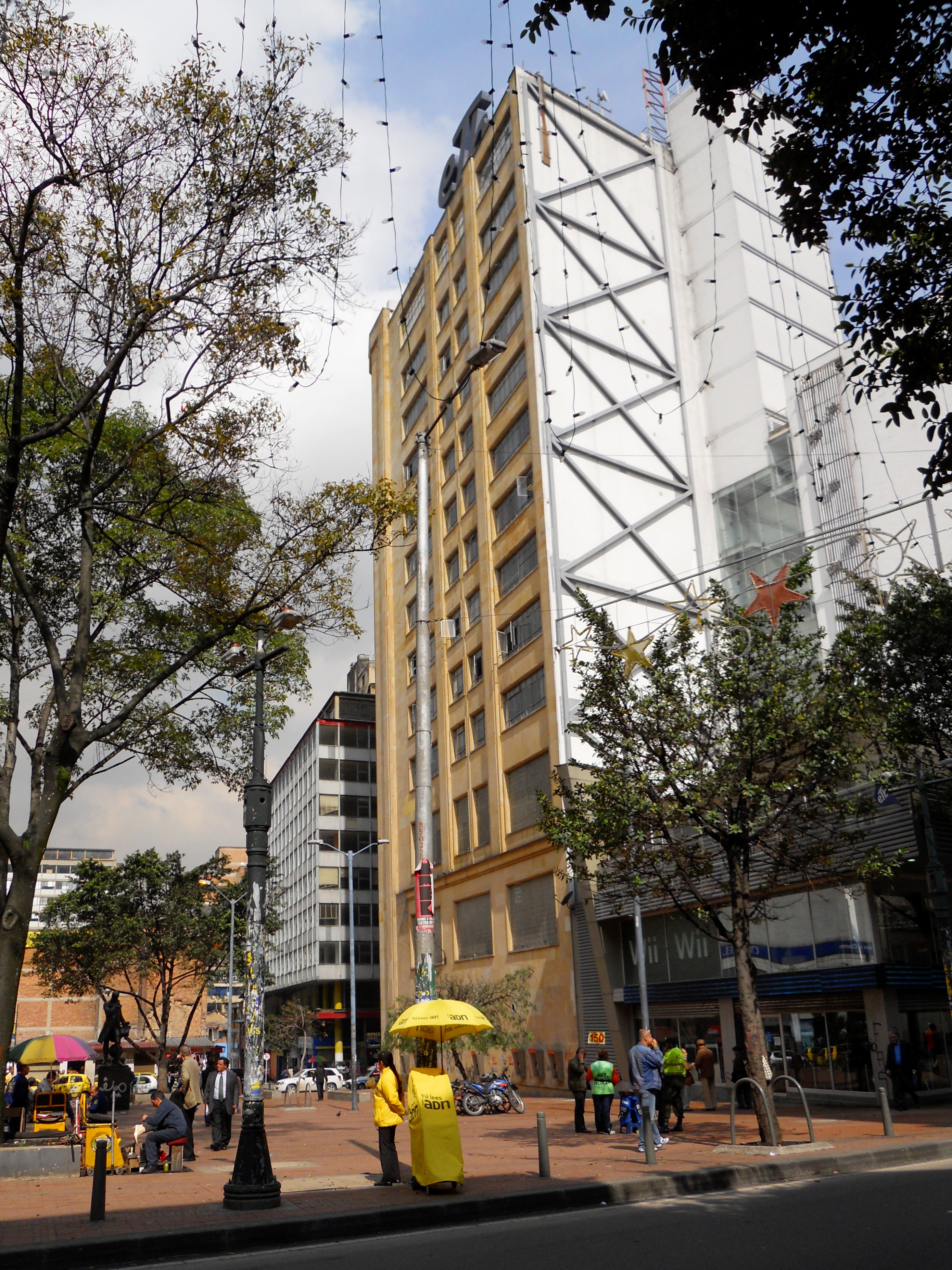 Edificio ETB, carrera Séptima con calle Veinte.